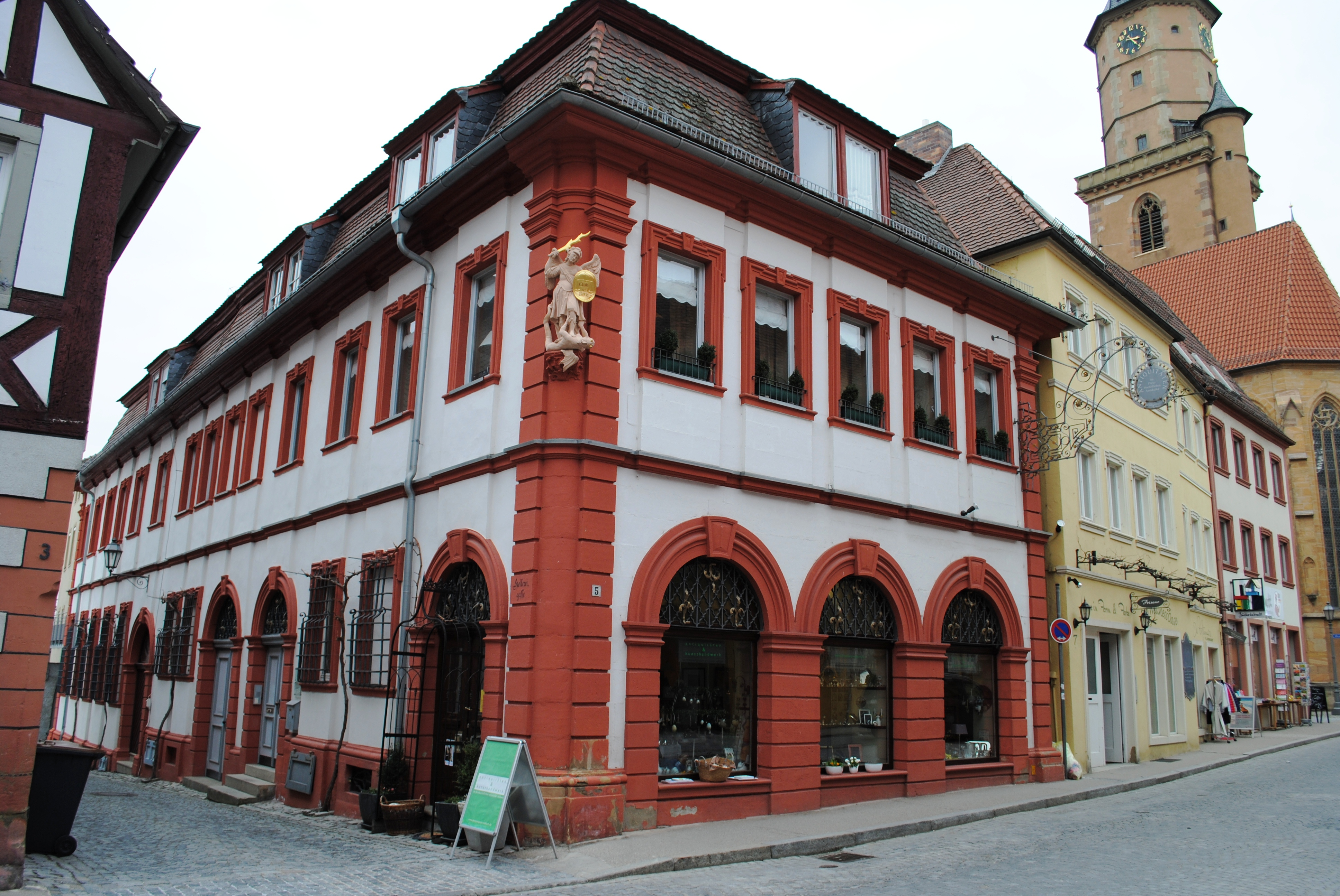 Ehemalige Amtskellerei, Volkach, heute dem Kloster St. Maria der Franziskanerinnen zugehörig, zweigeschossiger Mansarddachbau, Sandsteinquader, mit reicher Barockgliederung, 1. Hälfte 18. Jh.